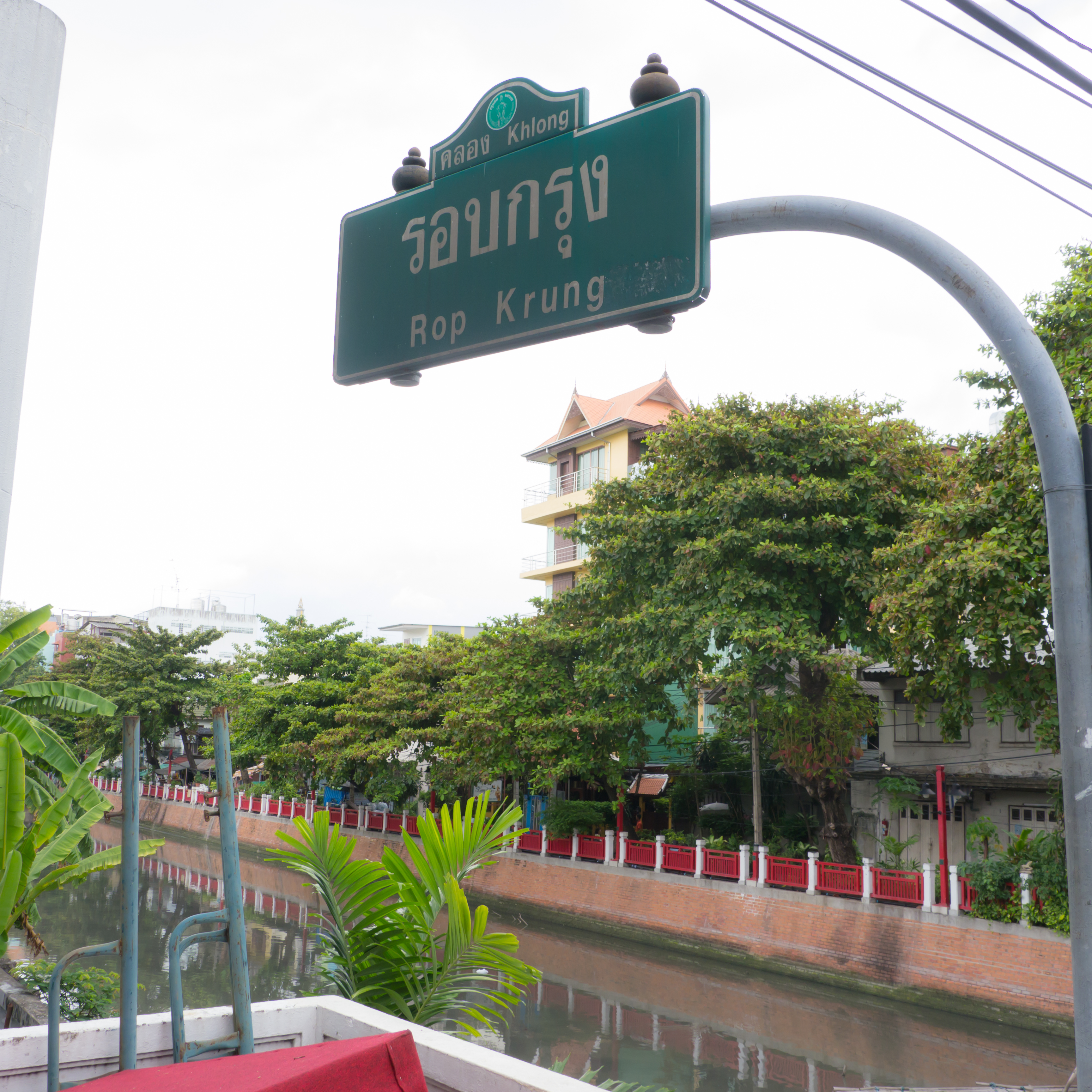 คลองรอบกรุง